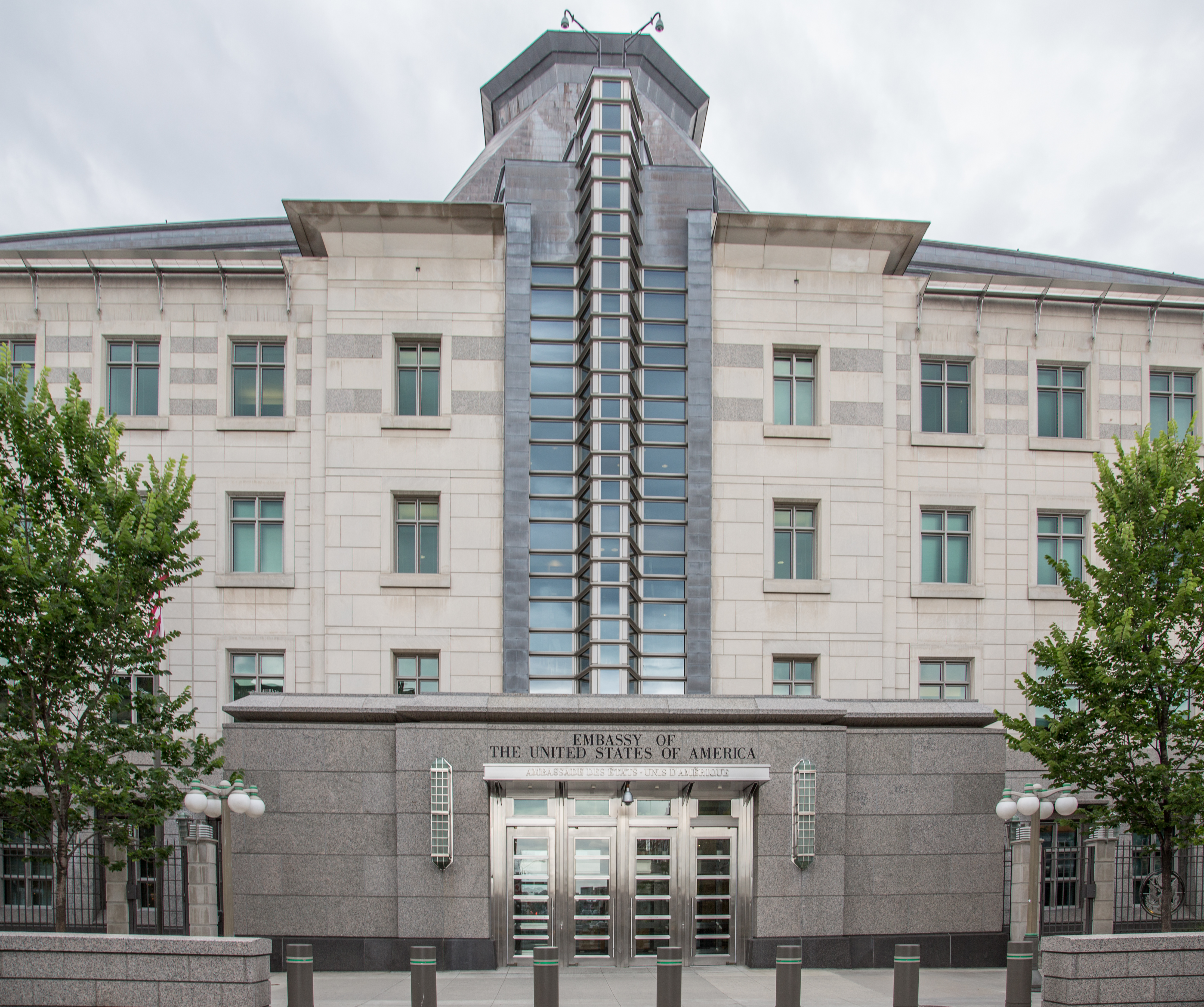 Ottawa, Ontario, Canada